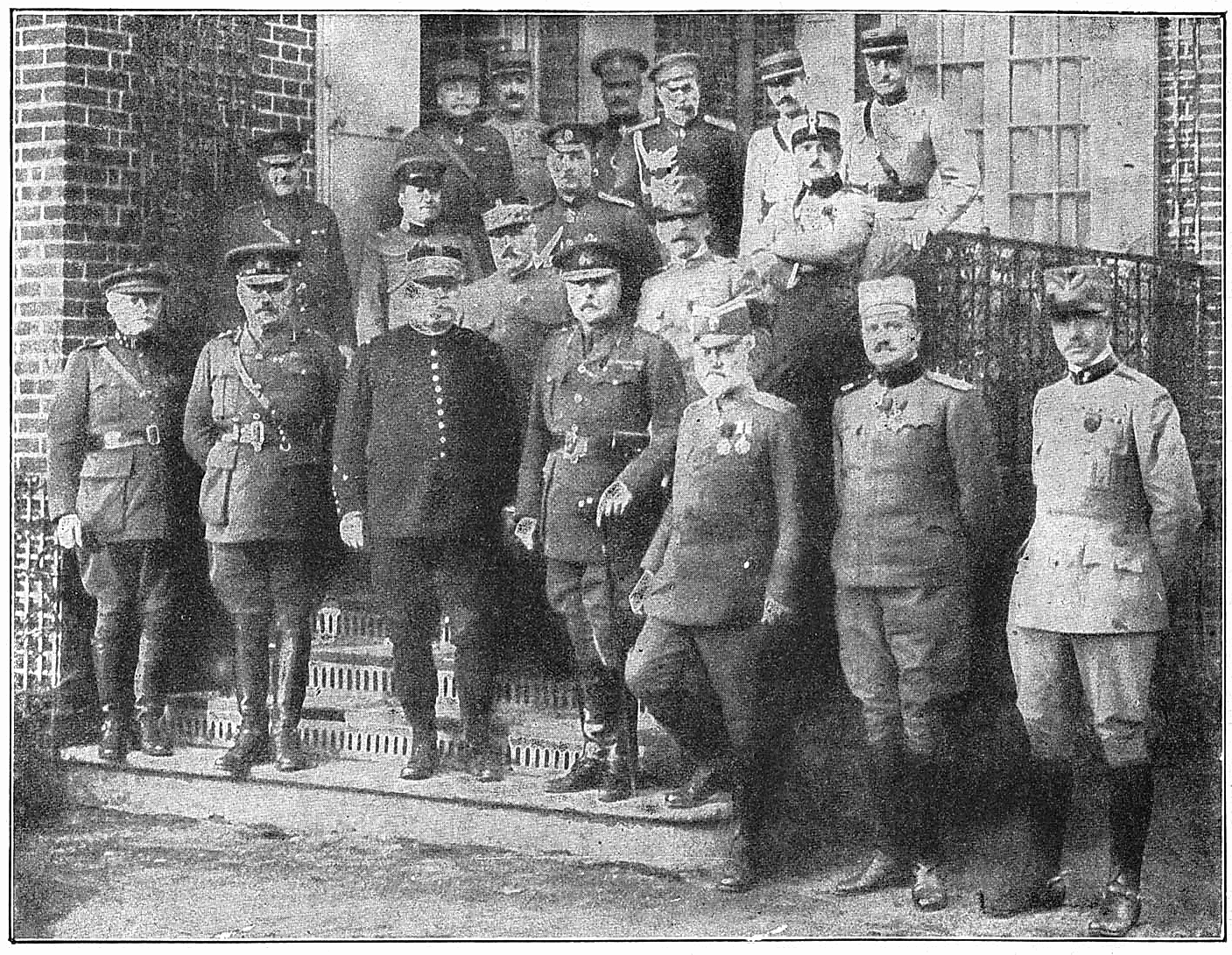 Participantii la Conferinta interaliata de la Chantilly 15-16 noiembrie 1916